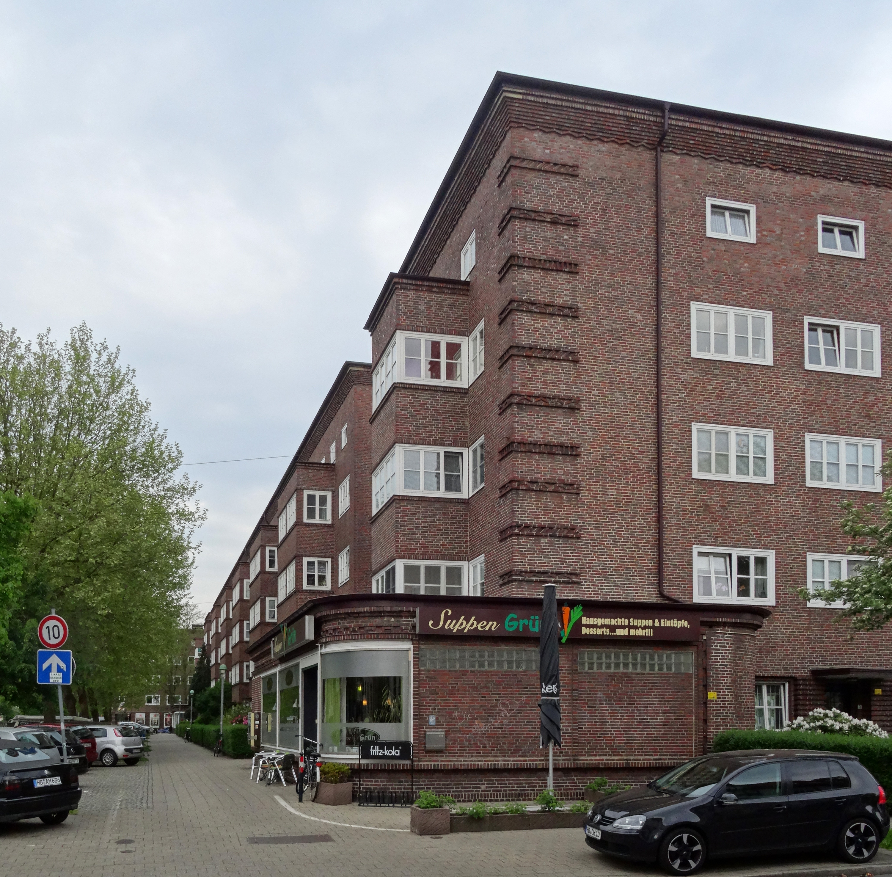 Wohnanlage Hamburger Straße in Bremen, Hamburger Straße 222Die Gesamtanlage ist ein geschütztes Kulturdenkmal in der Freien Hansestadt Bremen, mit der Nr. 0472 beim Landesamt für Denkmalpflege registriert.